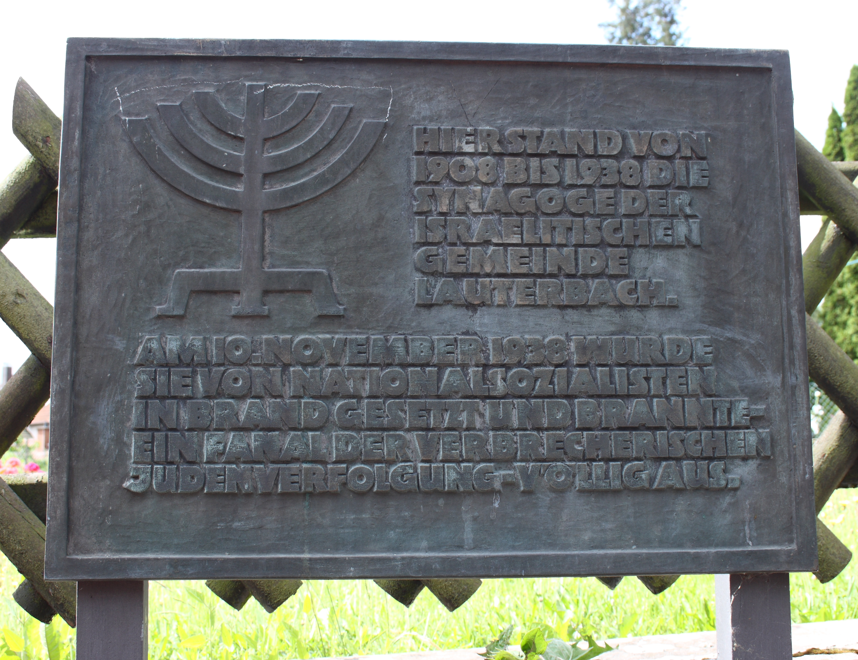 Gedenktafel zur Erinnerung an die zerstörte Synagoge in Lauterbach im Vogelsbergkreis (Hessen)